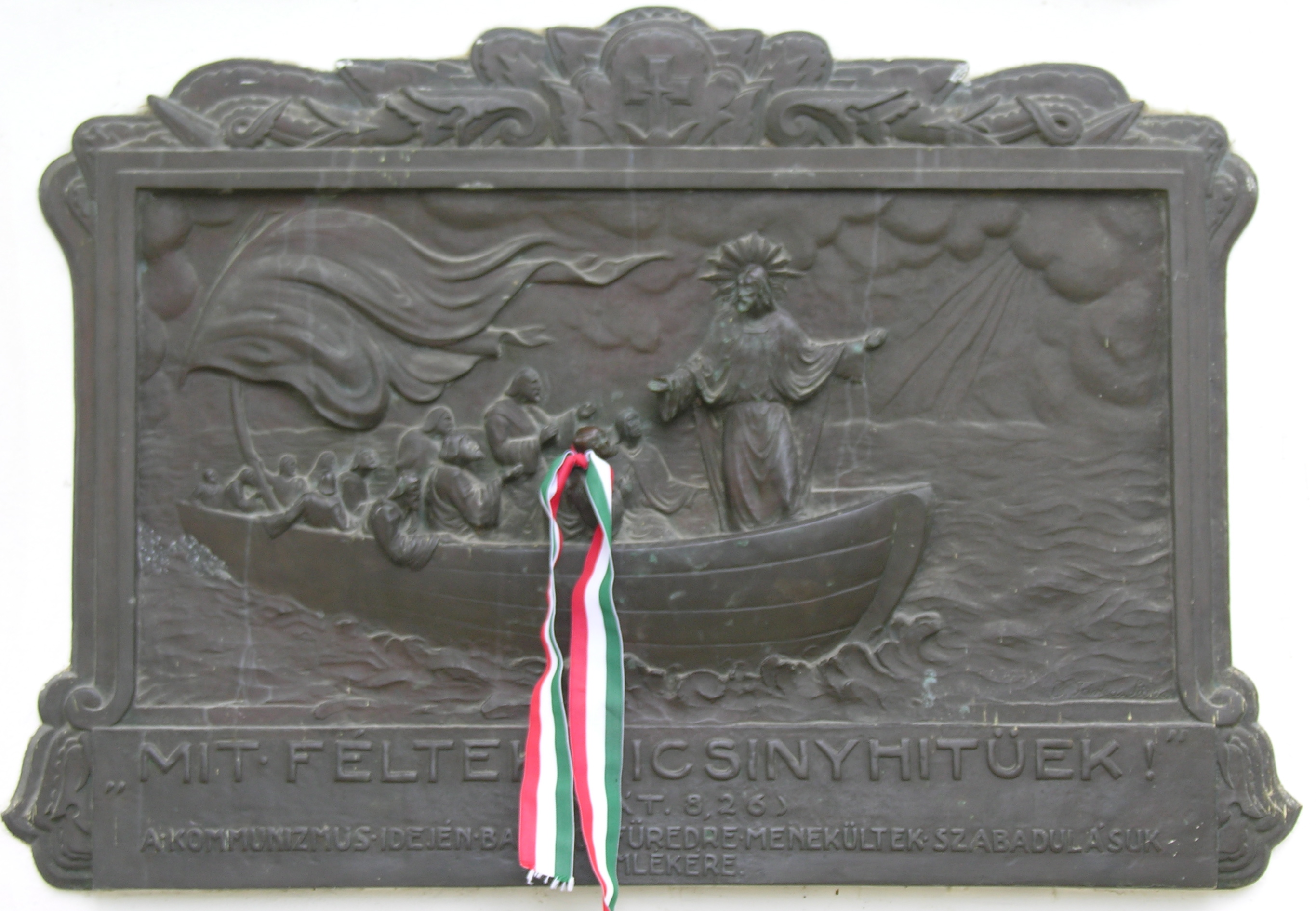 A kommunista terror (1919) idején Balatonfüredre menekültek emléktáblája, Balatonfüred, Kerektemplom, Blaha Lujza utca elején